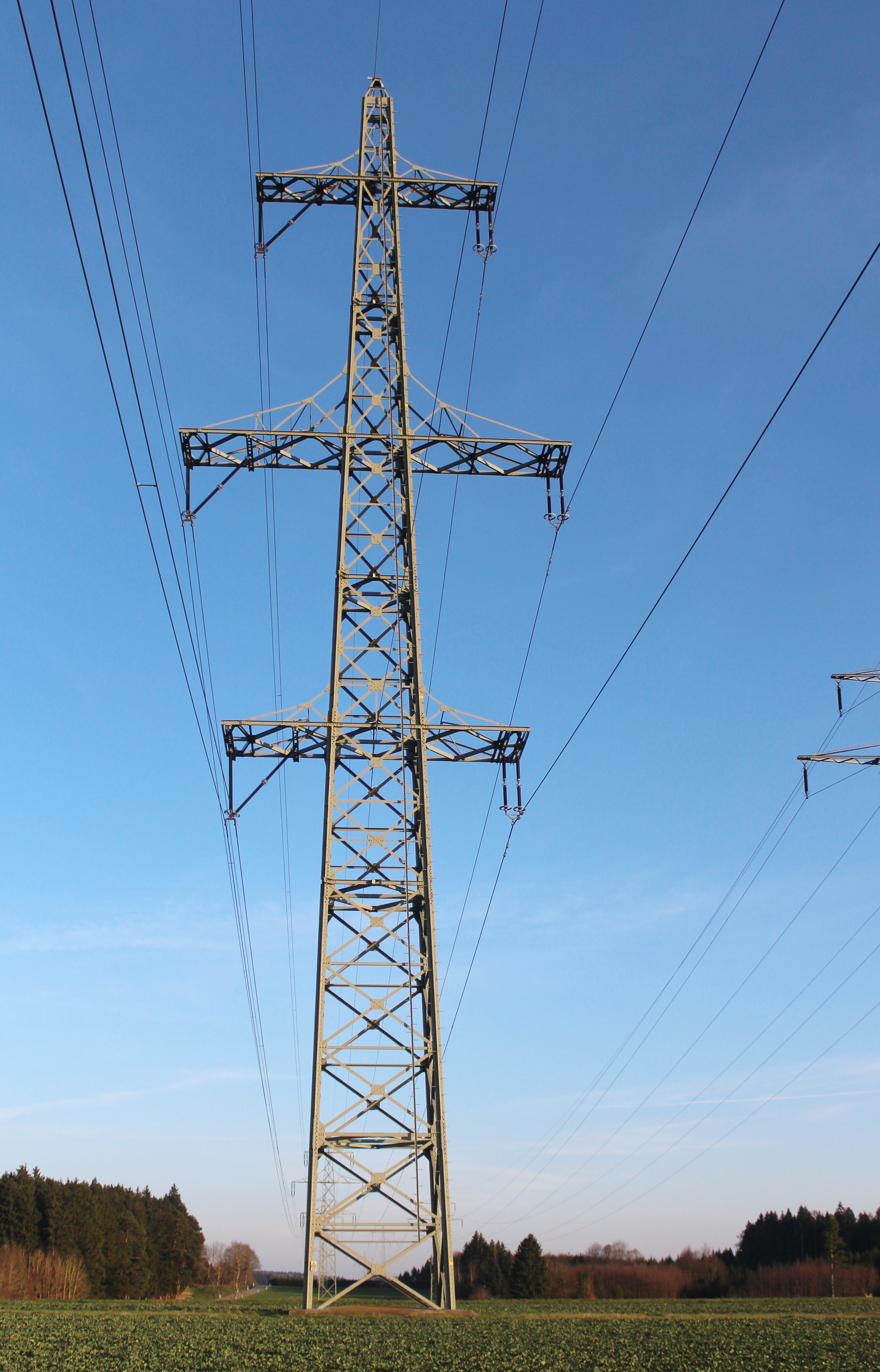 Mast 30 der Anlage 4509